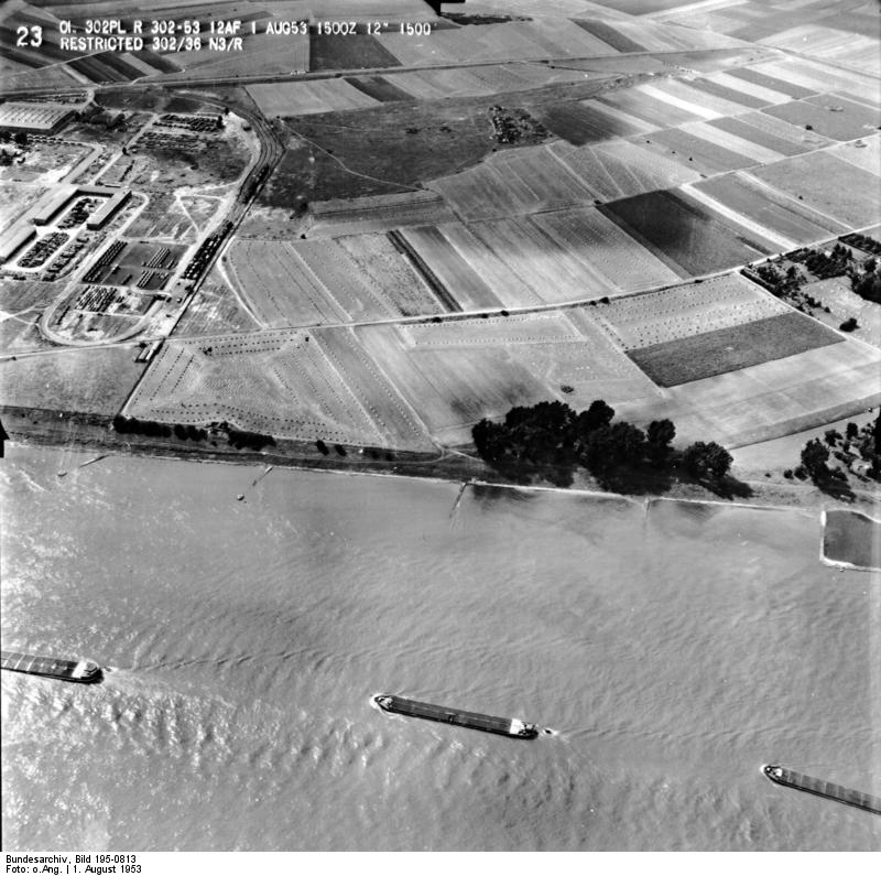 Rheinbefliegung der Alliierten 1953